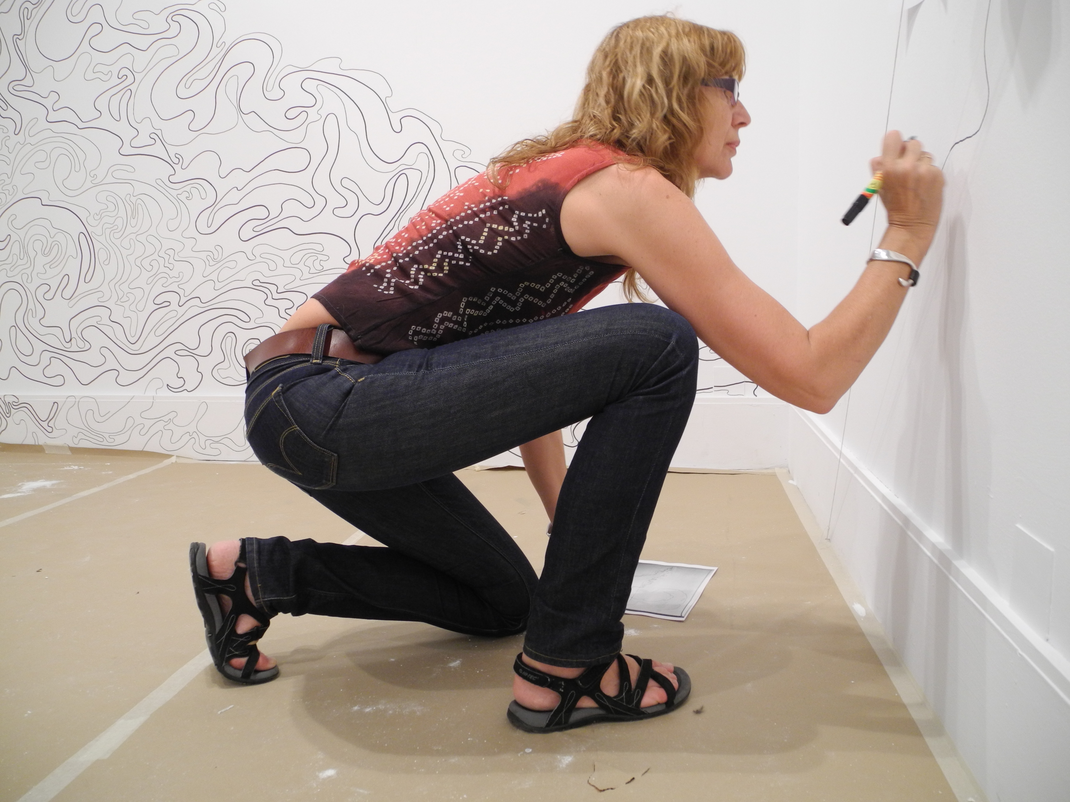 María Reina Salas elaborando una exposición